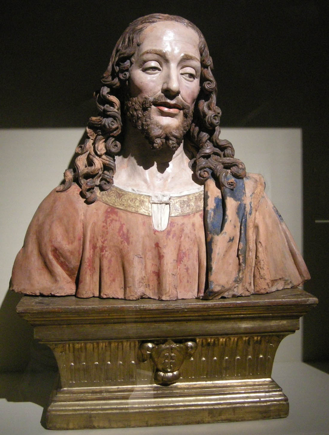 Pietro torrigiani, redentore, 1500-1510 circa, da cripta di s. trinita